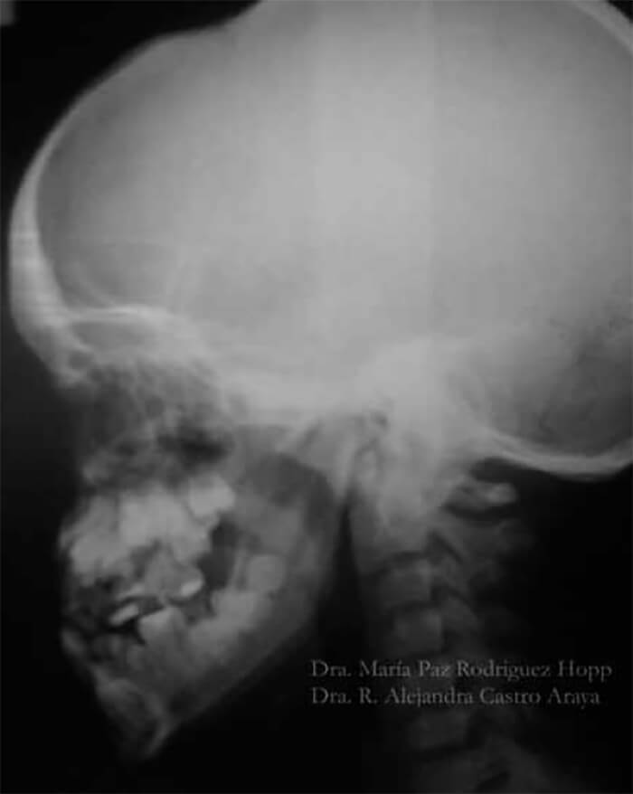 Tendência a classe III esquelética.